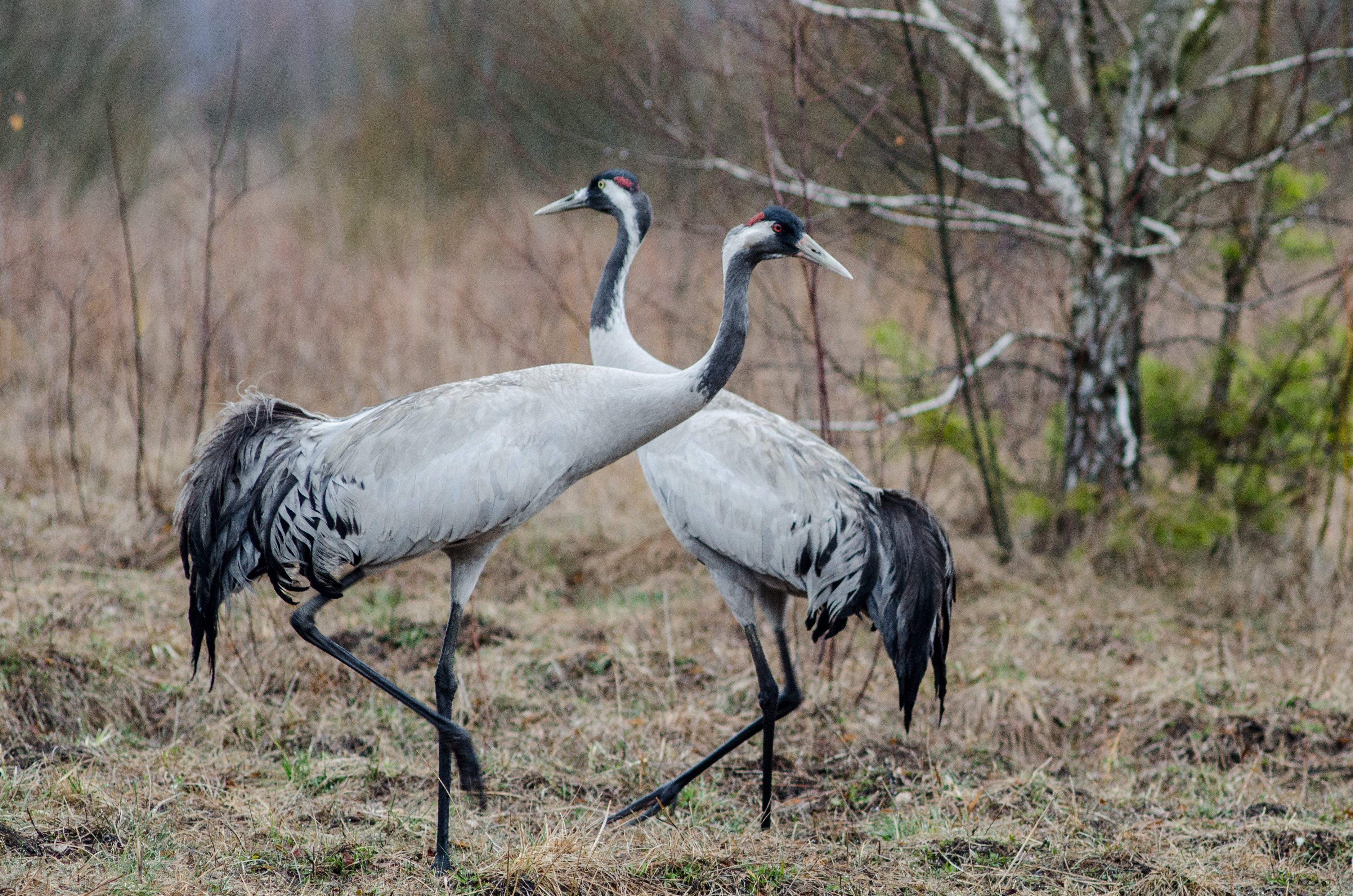 Міжрічинський, міжріччя Дніпра та Десна на території Козелецького та Чернігівського районів